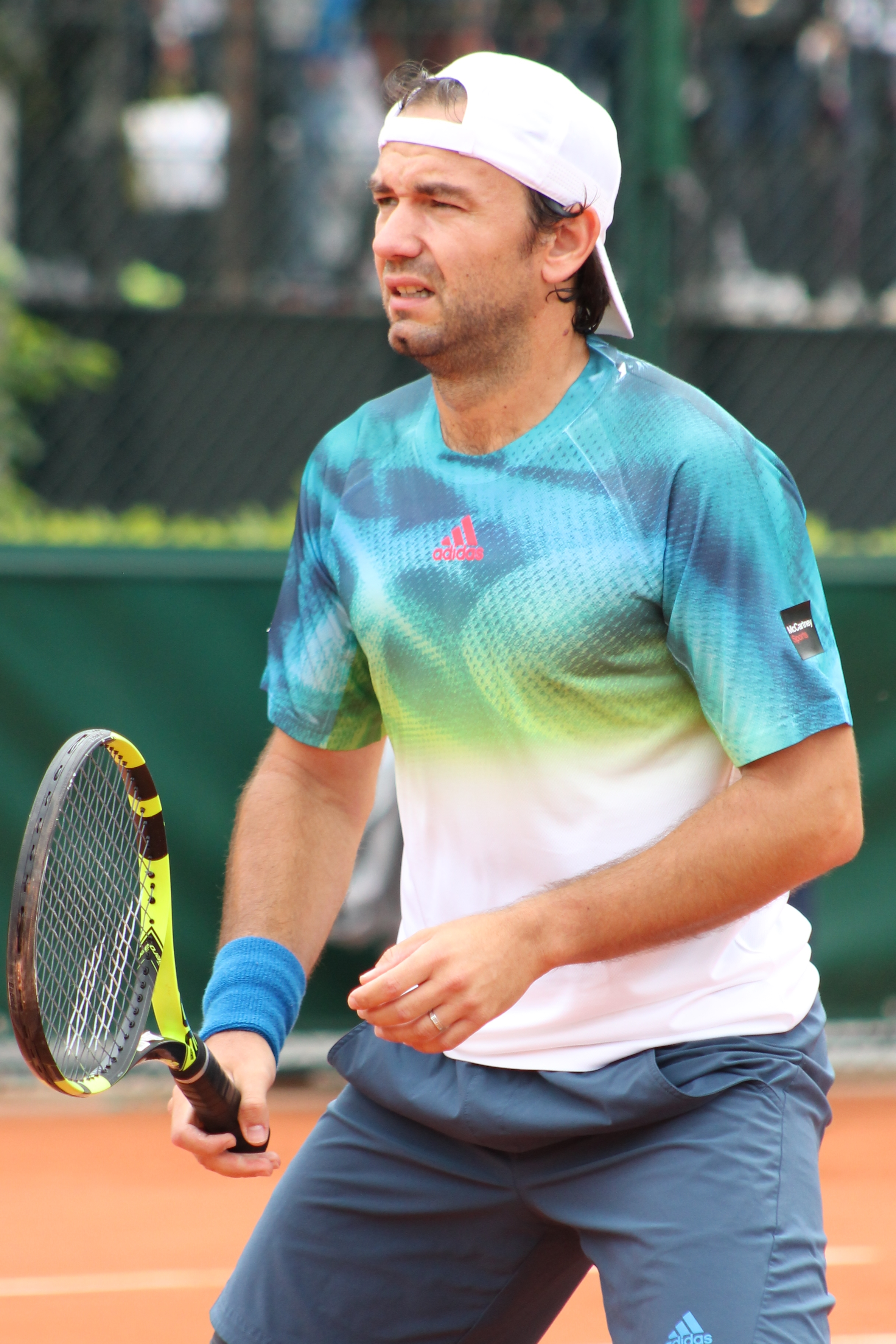 Mergea RG16 (5)